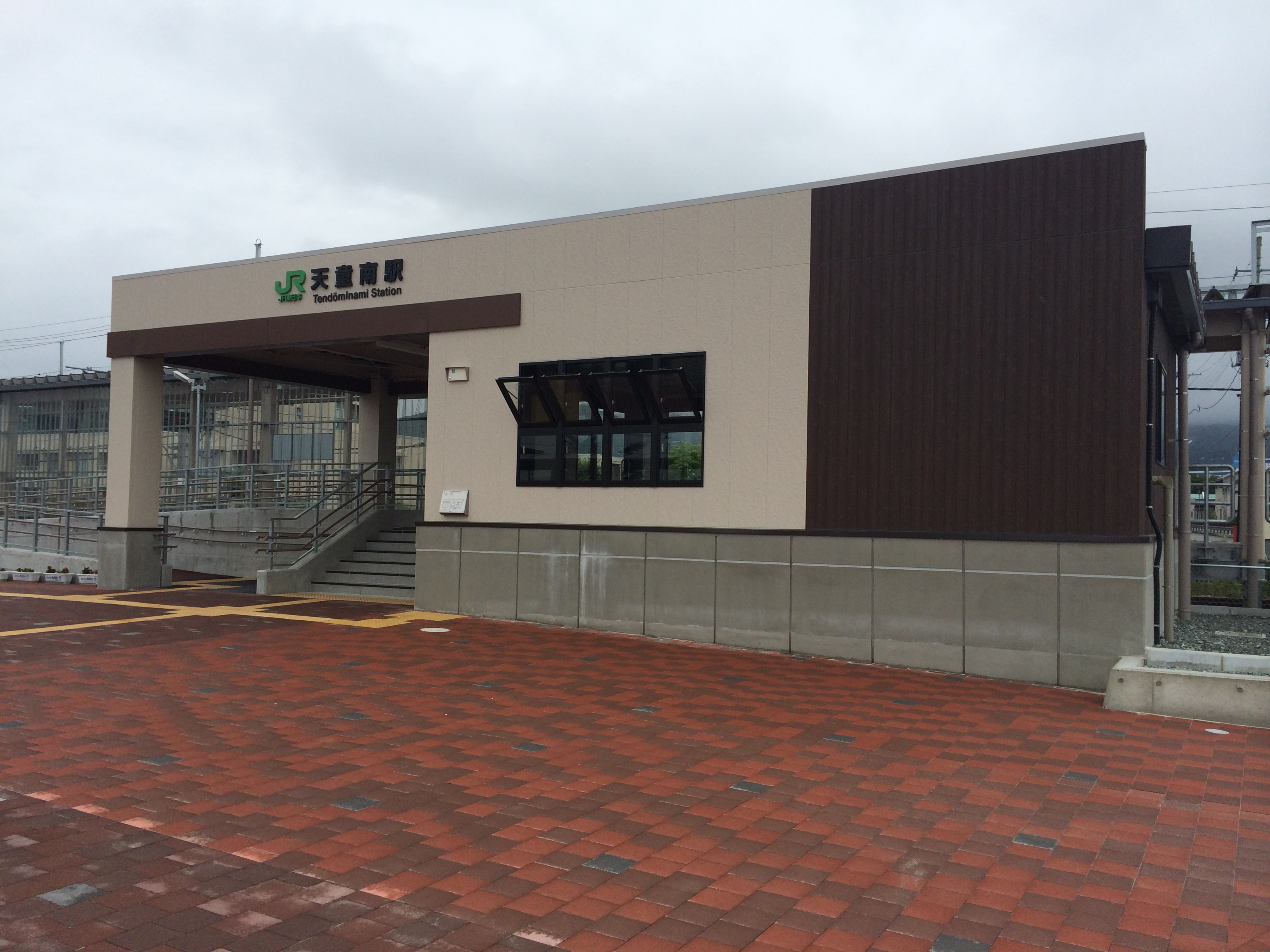 東日本旅客鉄道株式会社奥羽本線（JR山形線）天童南駅駅舎